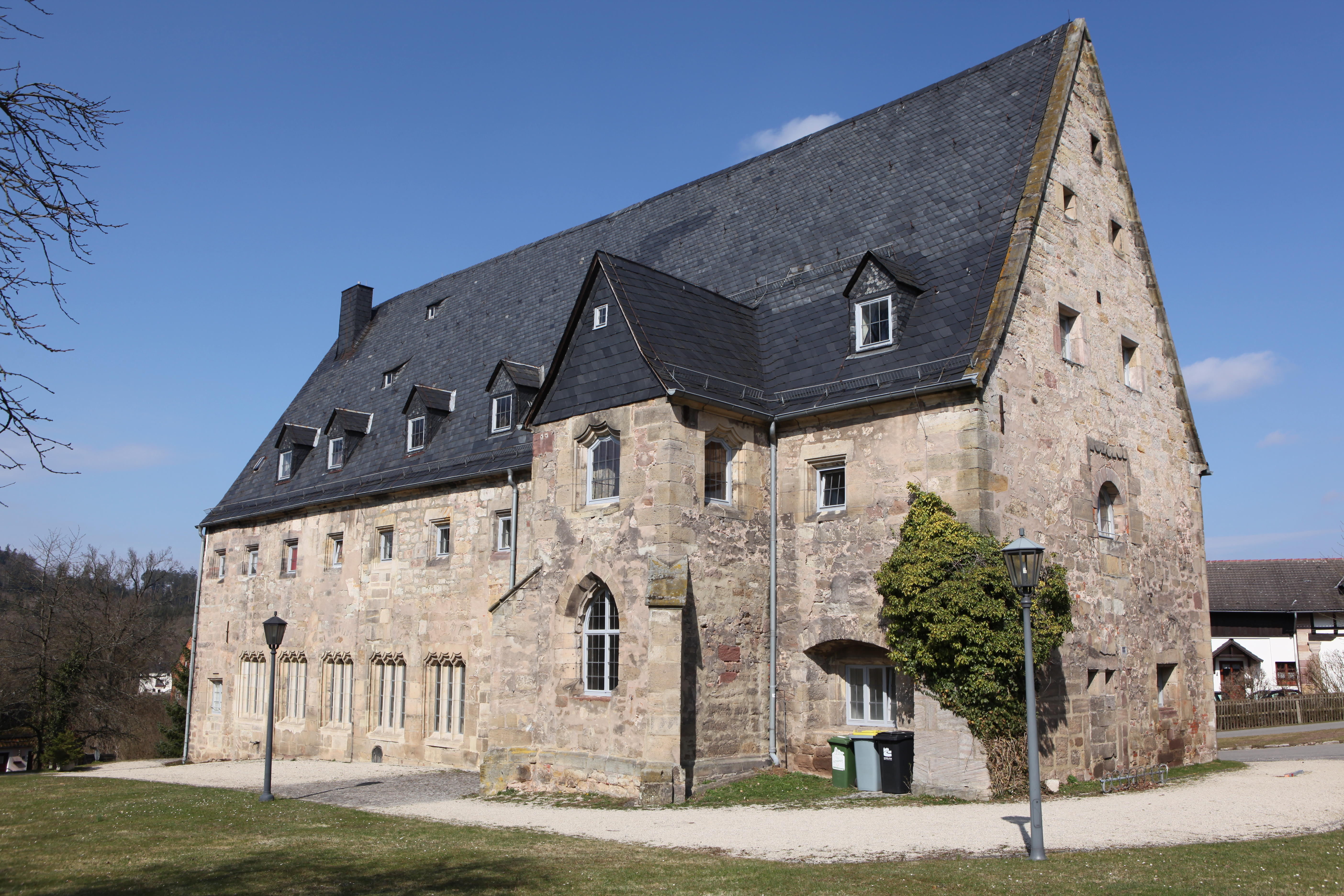 Refektorium der ehemaligen Benediktinerabtei Mönchröden in Rödental, Landkreis Coburg